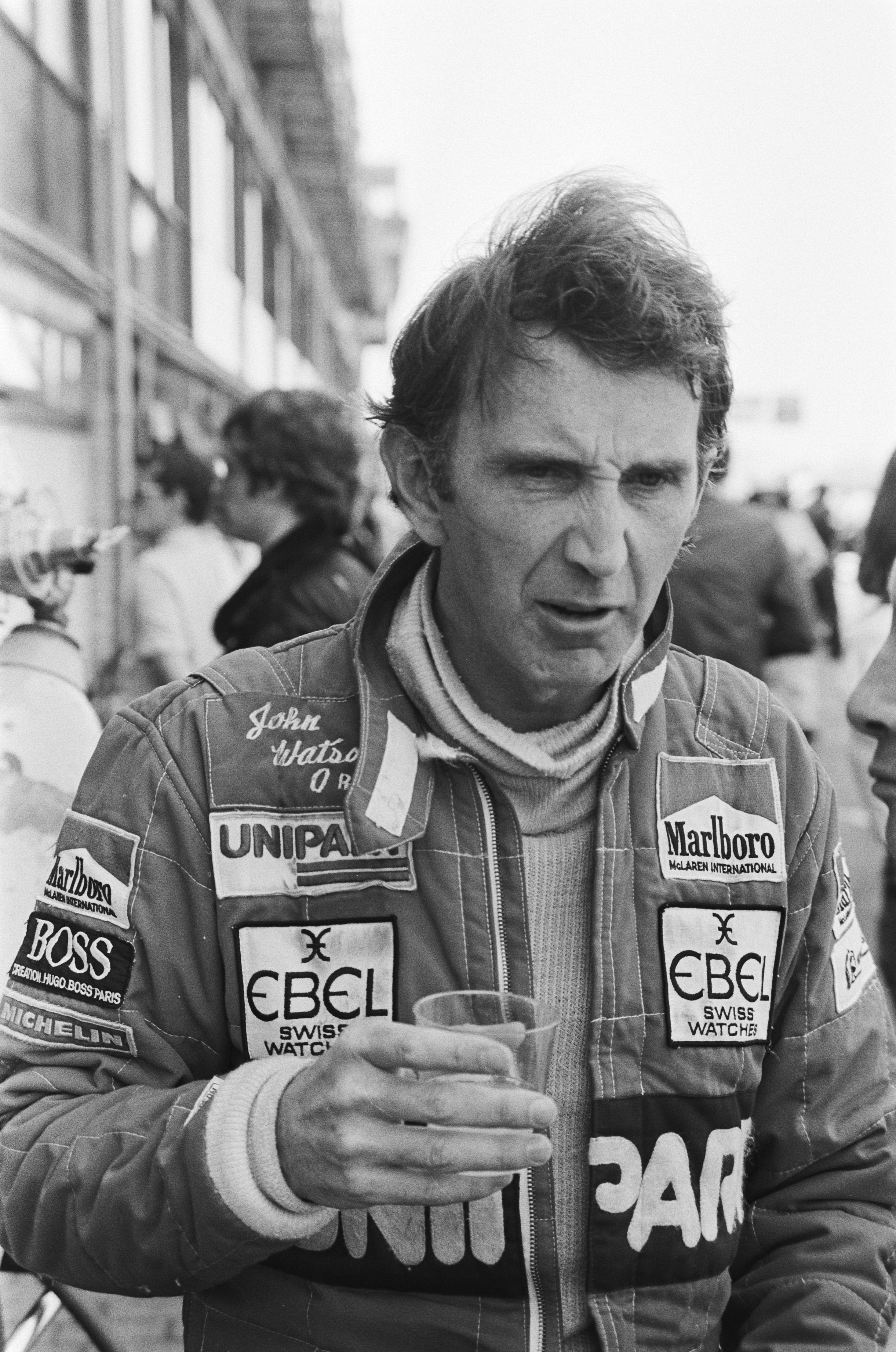 Grand Pris van Nederland te Zandvoort; koppen coureurs, John Watson.